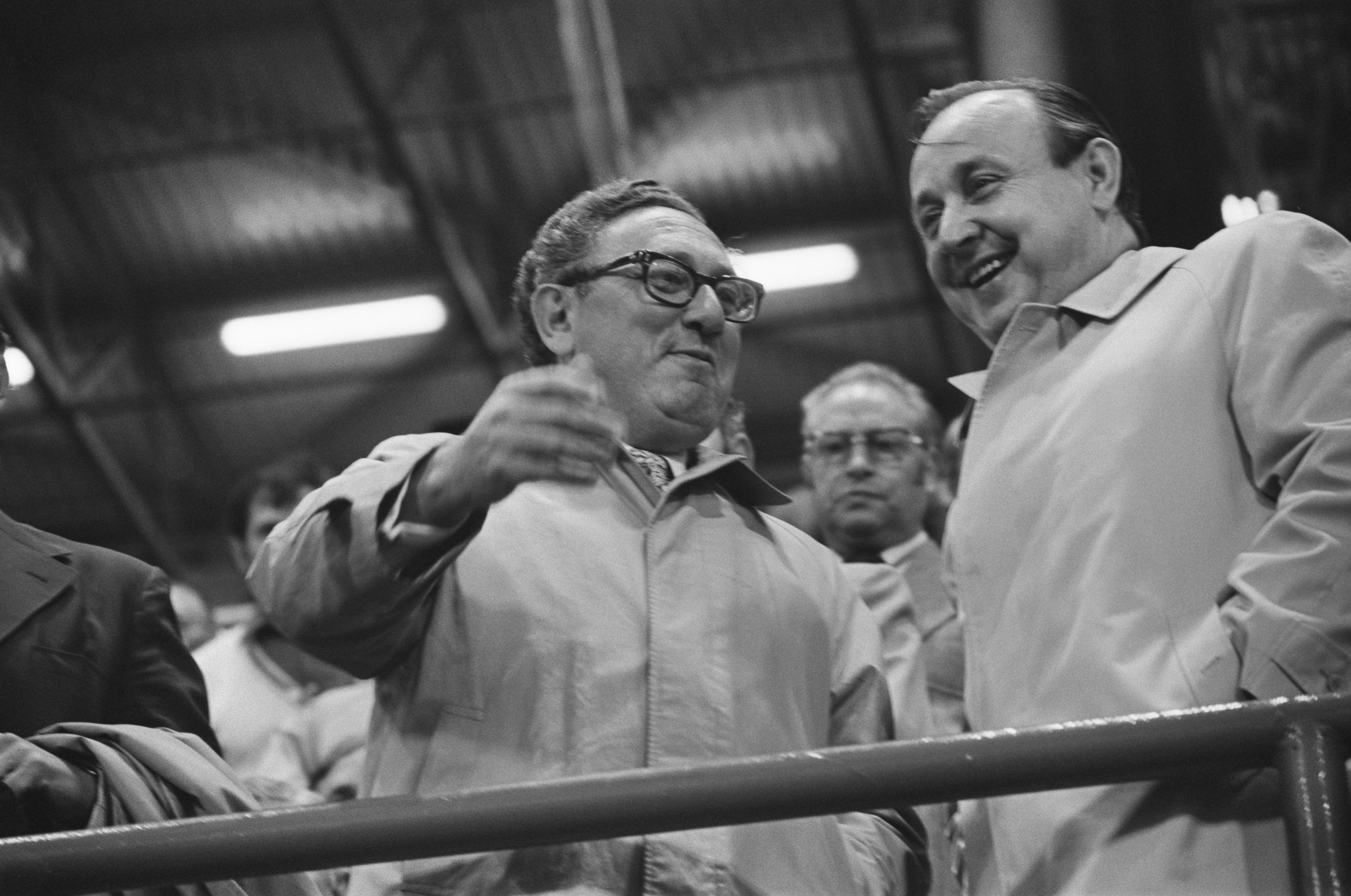 Collectie / Archief : Fotocollectie Anefo Reportage / Serie : [ onbekend ] Beschrijving : WK 74 Nederland tegen Brazilie 2-0, Henry Kissinger op tribune, rechts van hem Genscher Datum : 3 juli 1974 Locatie : Dortmund Trefwoorden : politici, sport, voetbal Persoonsnaam : Genscher, Kissinger Henry Instellingsnaam : Nederlands Elftal Fotograaf : Verhoeff, Bert / Anefo Auteursrechthebbende : Nationaal Archief Materiaalsoort : Negatief (zwart/wit) Nummer archiefinventaris : bekijk toegang 2.24.01.05 Bestanddeelnummer : 927-3027